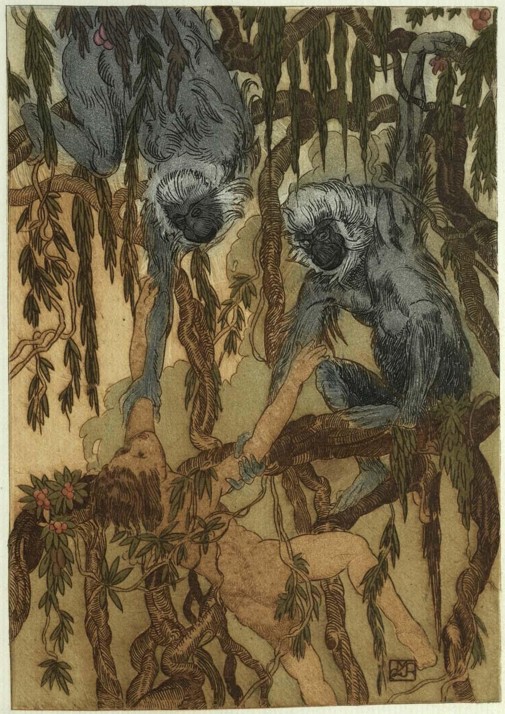 Illustration du Livre de la jungle de Kipling.